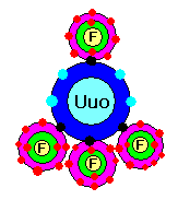 사플루오르화우누녹튬(UuoF4)의 분자 구조